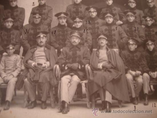 GABINETE FOTOGRAFICO DE LA ACADEMIA DE INFANTERIA, CURSO 1919/20 1er SEMESTRE 12ª SECCION, TOLEDO